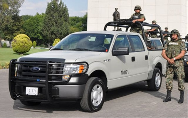 vehiculo de trasporte de tropas